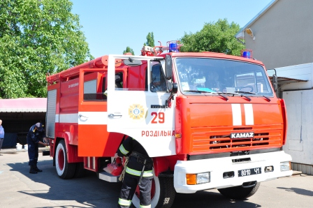 Пожарная